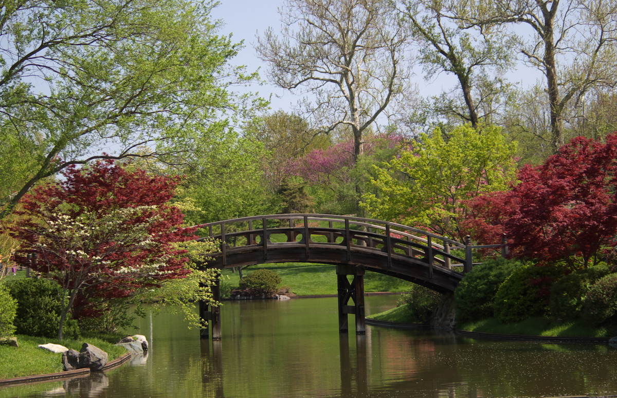 Botanical Garden, Saint Louis